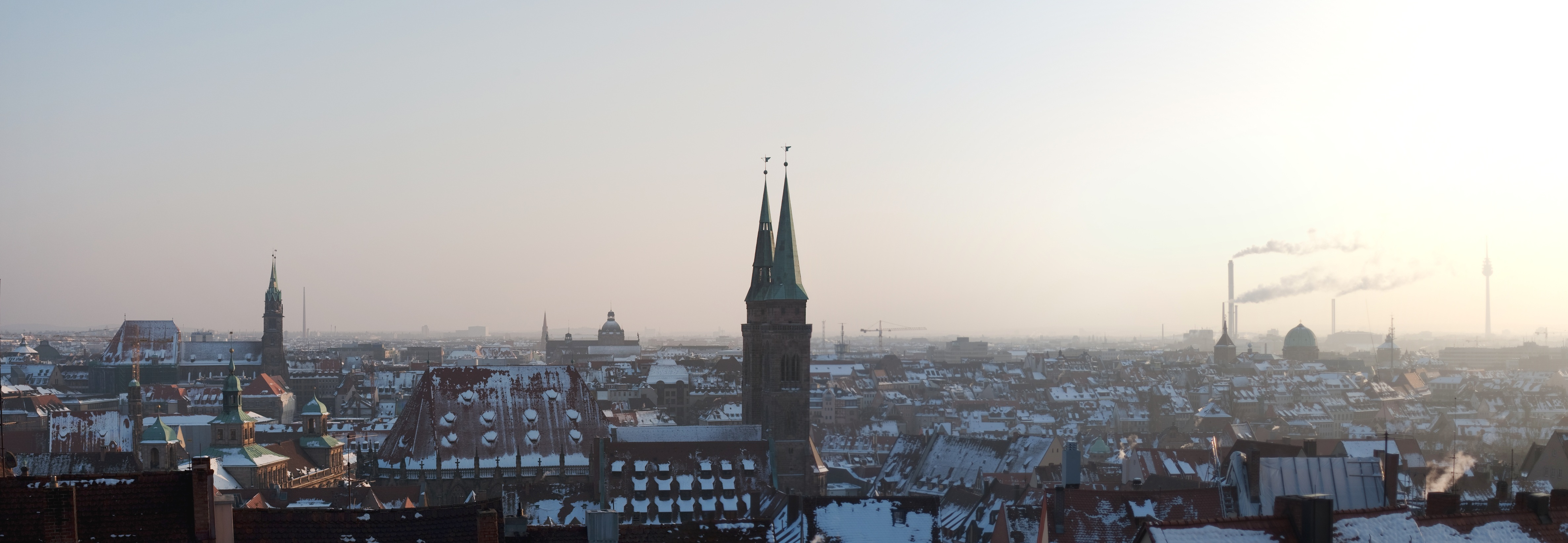 IMG_1284 IMG_1288